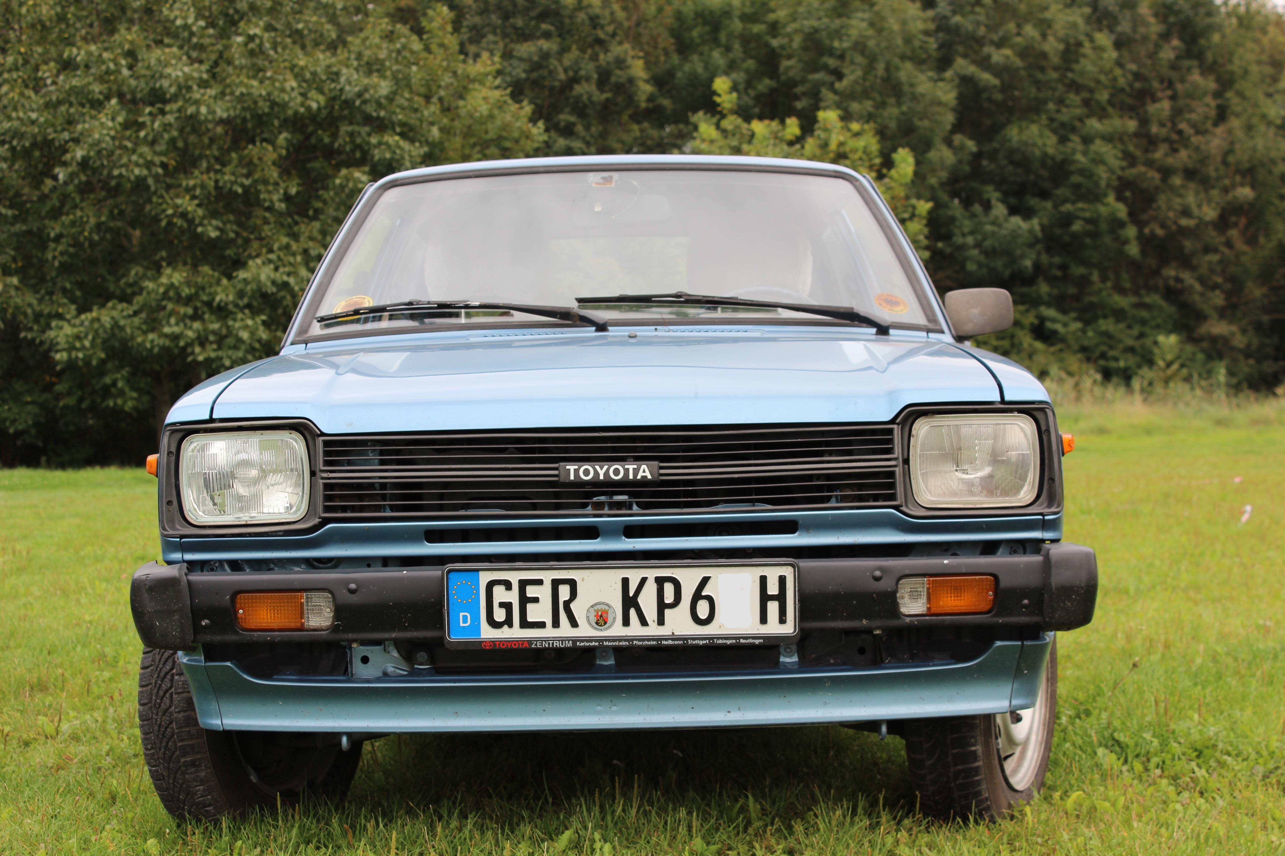 Toyota Starlet KP60 MK2